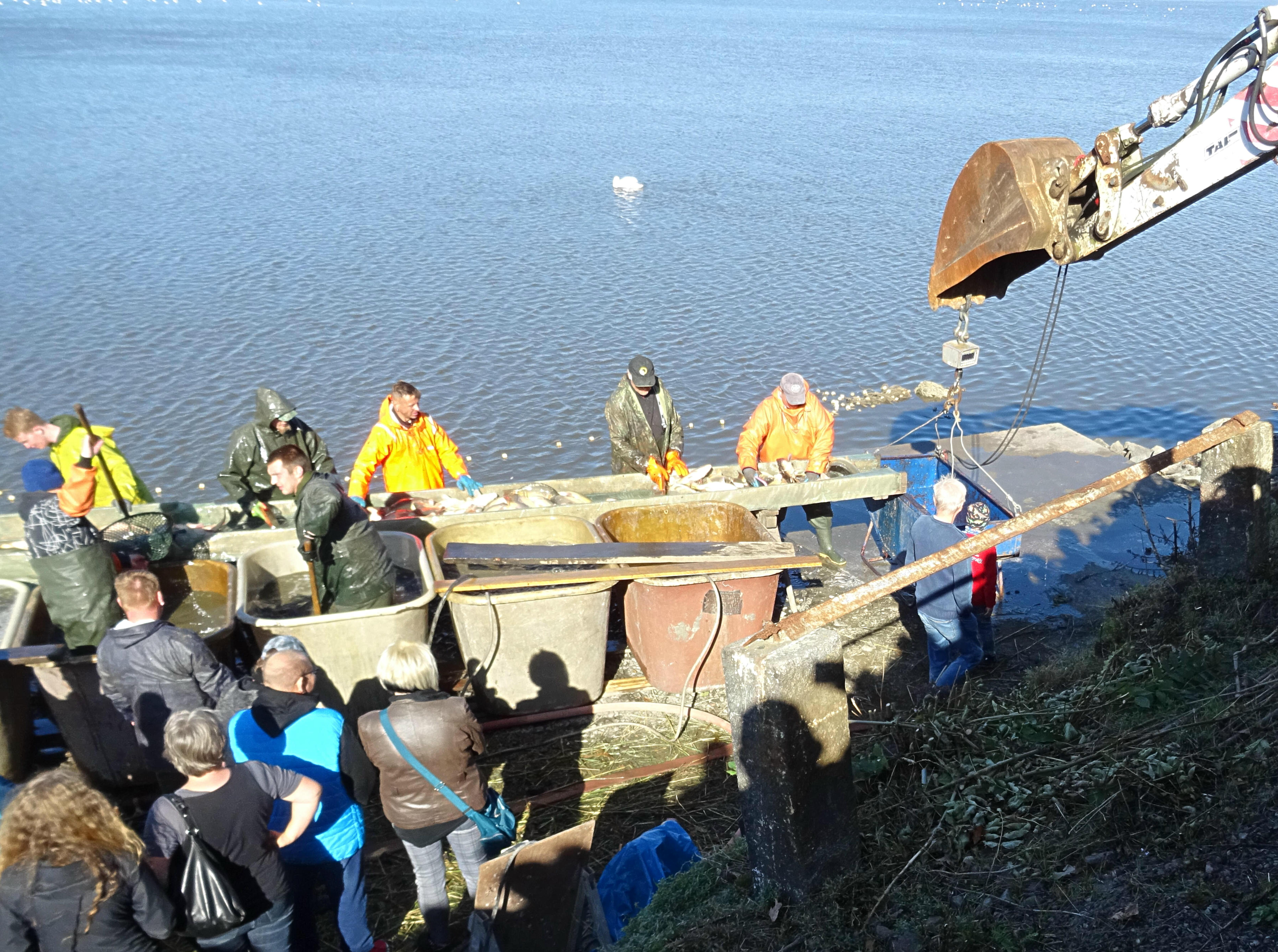 Horstseefischen: Seit 500 Jahren sind Zuchtfische aus Wermsdorf begehrt. Beim 50. Fischerfest vom 11. bis 13. Oktober 2019 wird das Abfischen aus dem 70 Hektar großen Horstsee traditionell gefeiert.